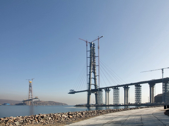 Строительство моста на остров Русский 10.11.2011